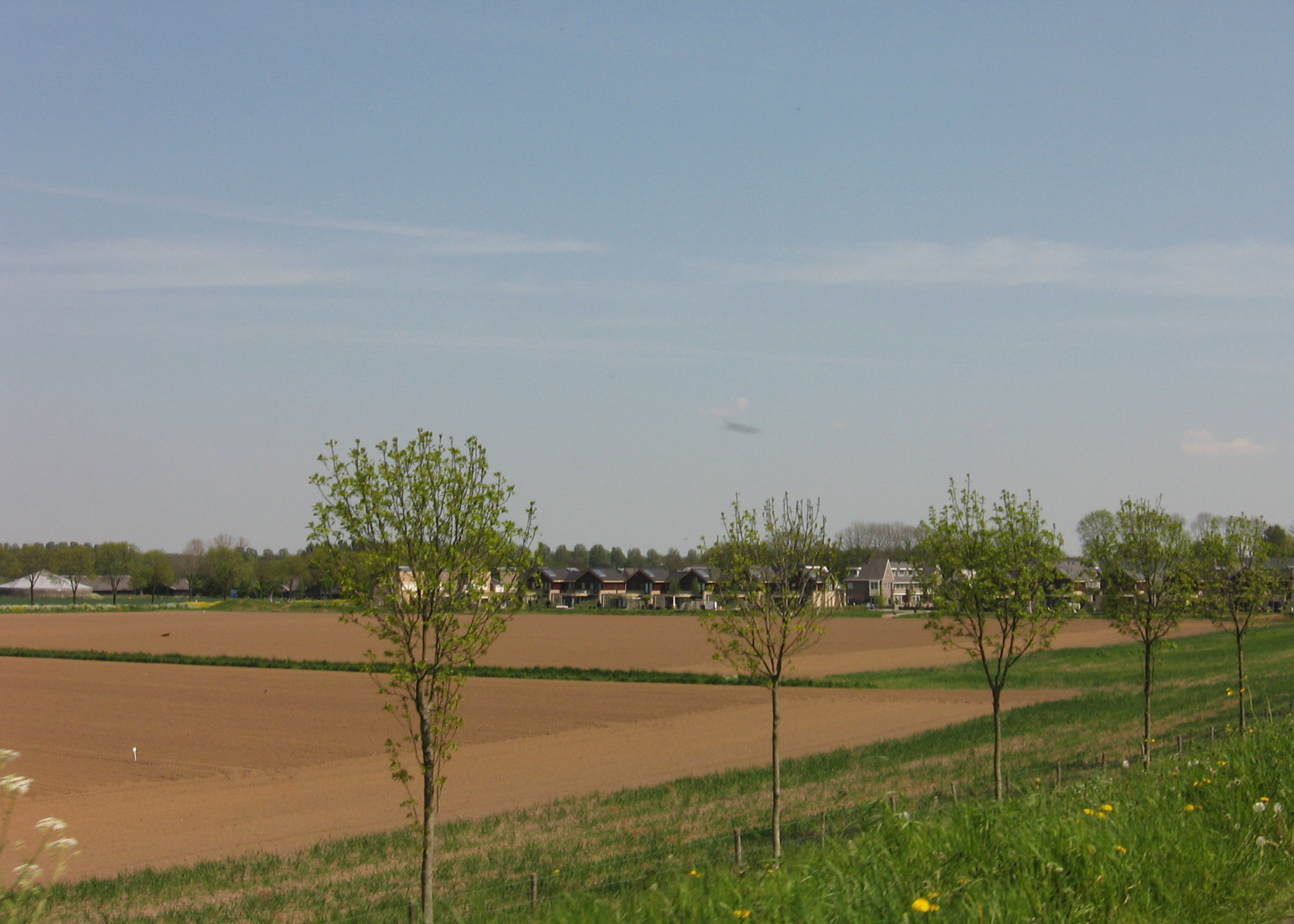 Vuren